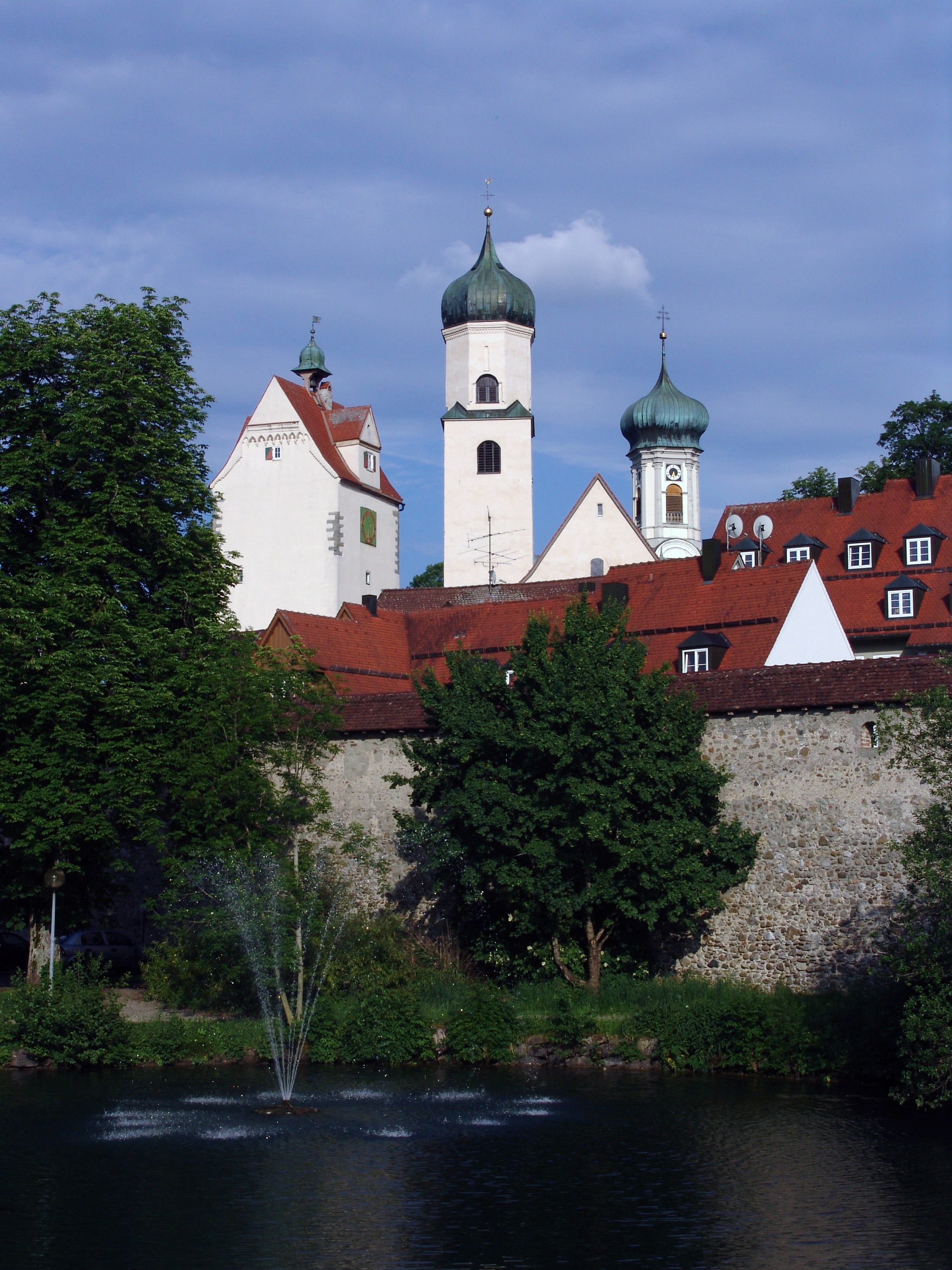 Isny, Wassertor, St. Nikolai(ev), St. Georg(rk), Stadtmauer